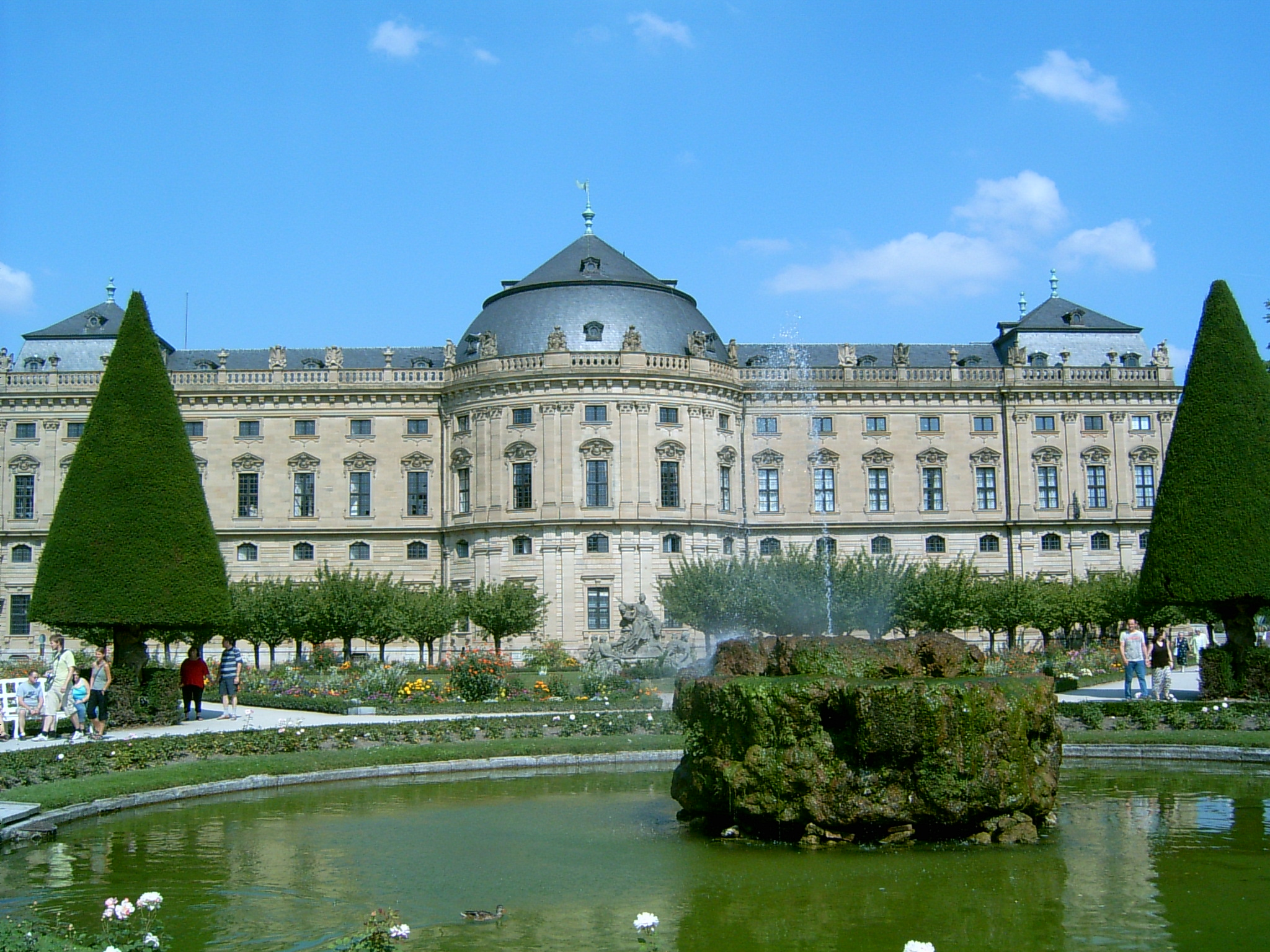 Gartenbrunnen der Würzburger Residenz, Hofseitenansicht in Würzburg.